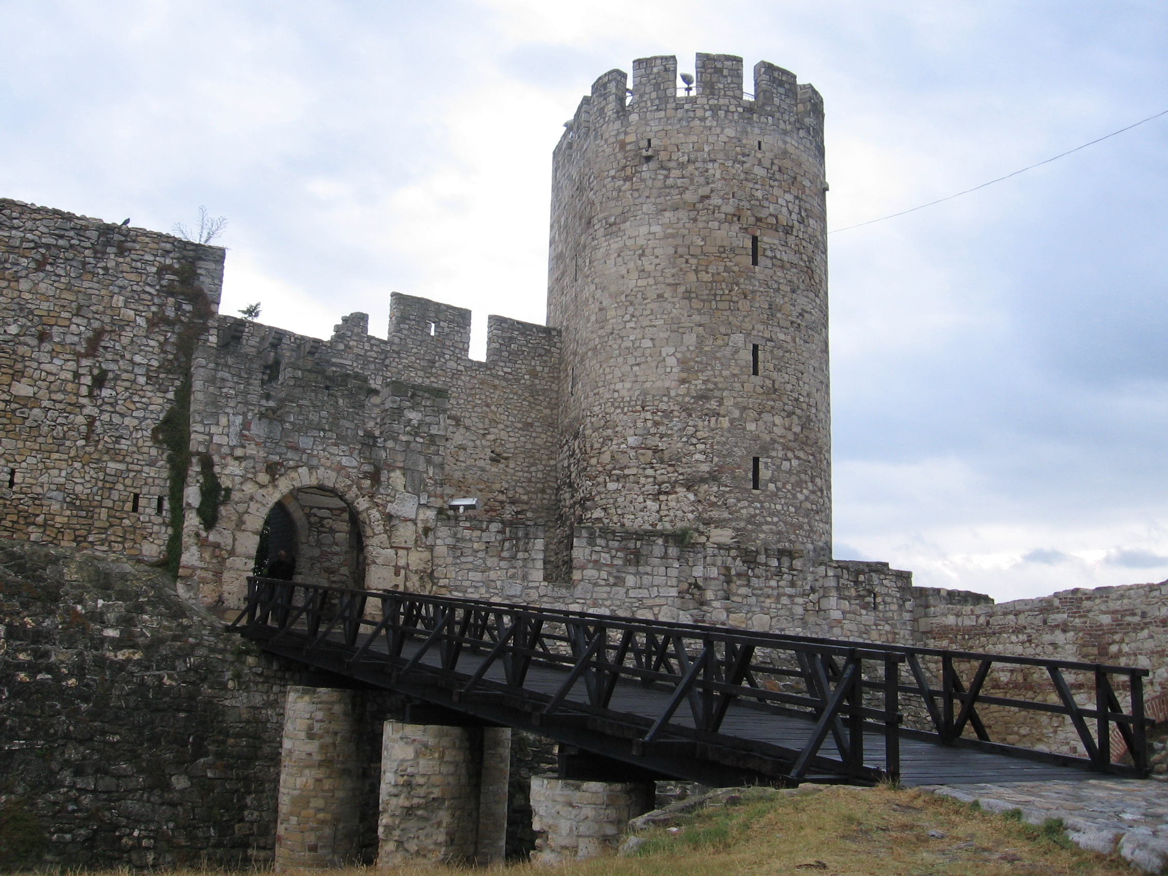 Калемегдан